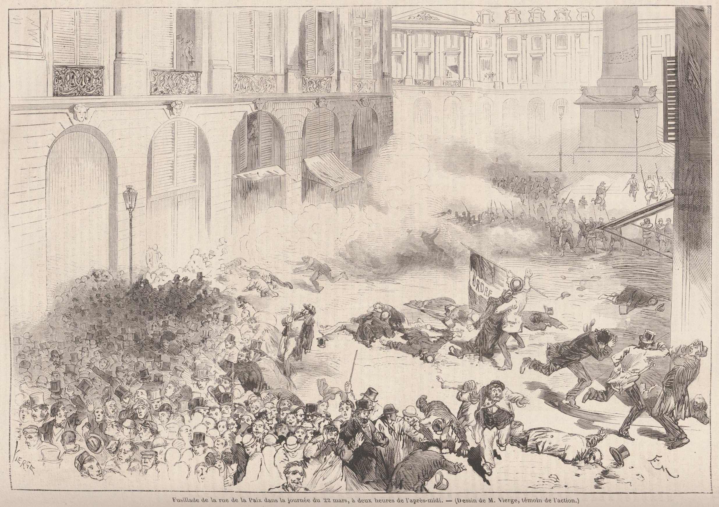 Fusillade de la rue de la Paix dans la journée du 22 mars, á deux heures de l'après midi, (dessin de M. Vierge, témoin de l'action.), en la revista Le Monde Illustré.